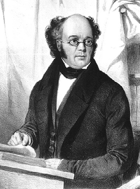 Jan Frans Willems (1793-1846)